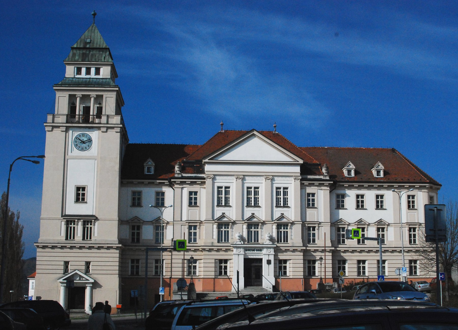 Das Gerichtsgebäude in Znaim